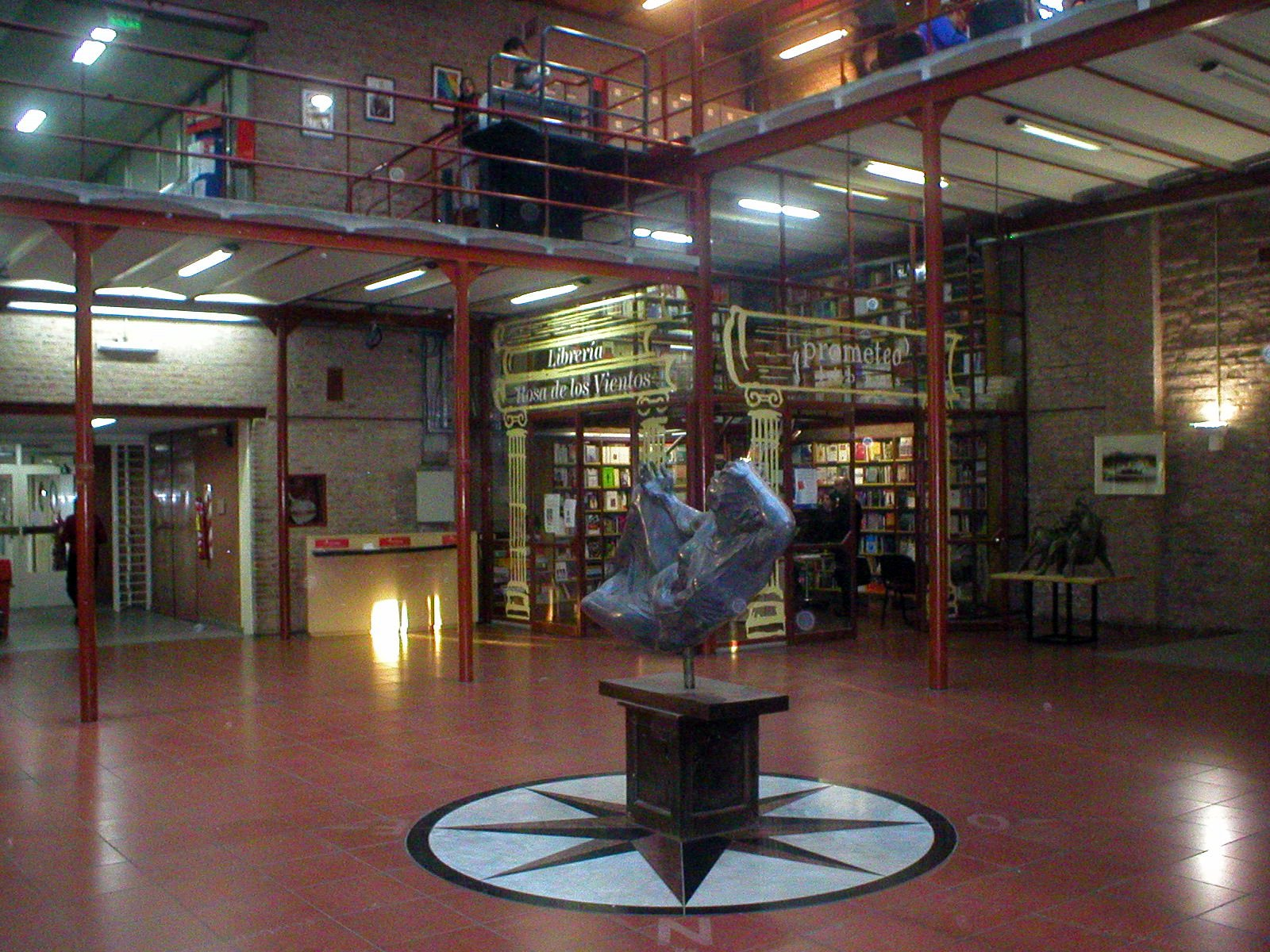 Hall central Universidad Nacional de Quilmes: "Rosa de los Vientos".